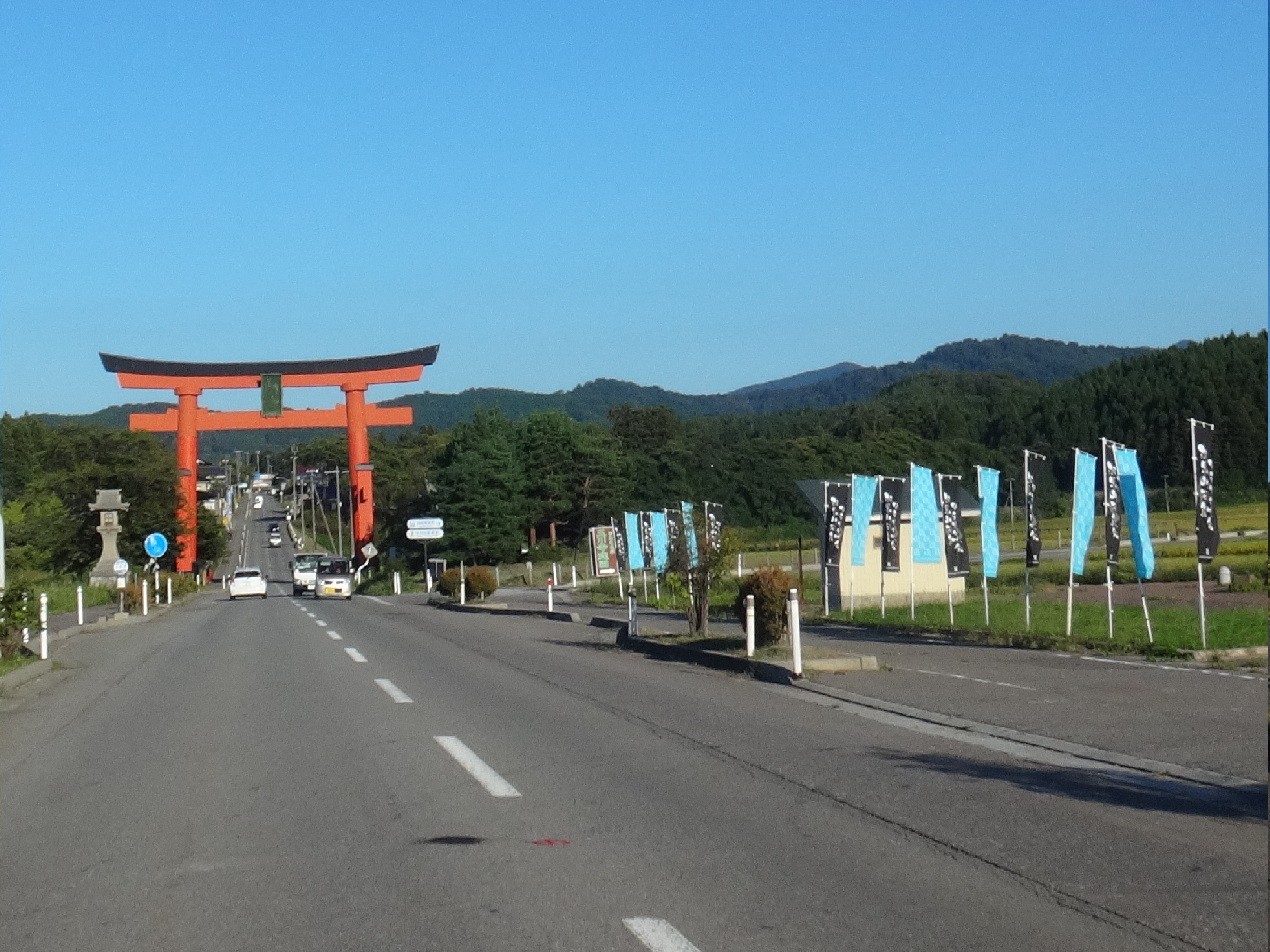 出羽三山神社大鳥居と羽黒山